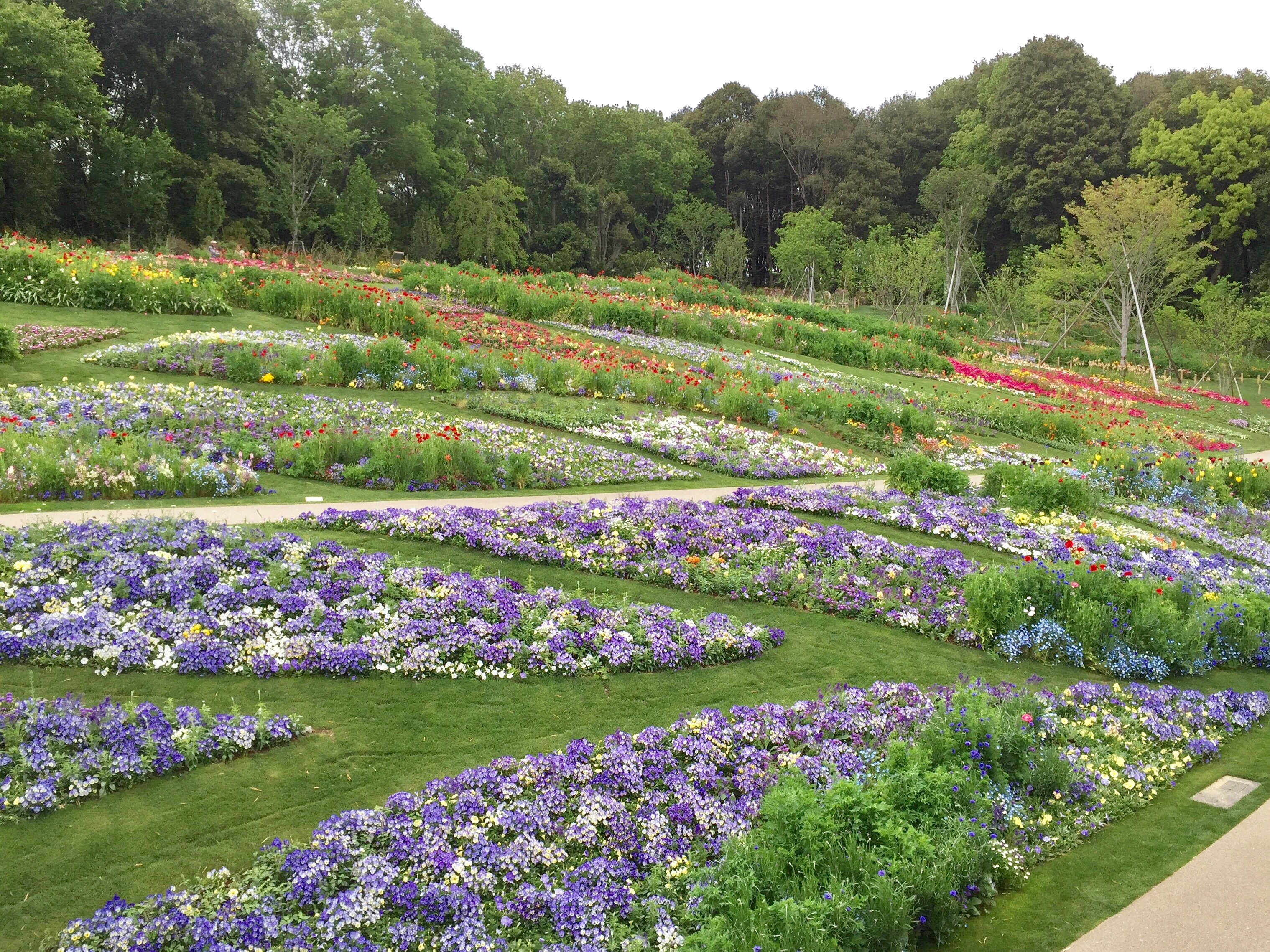 第33回全国都市緑化よこはまフェア（ガーデンネックレス横浜2017）の里山ガーデン会場。横浜動物の森公園の植物公園予定地の一部（約20ha）で開催。